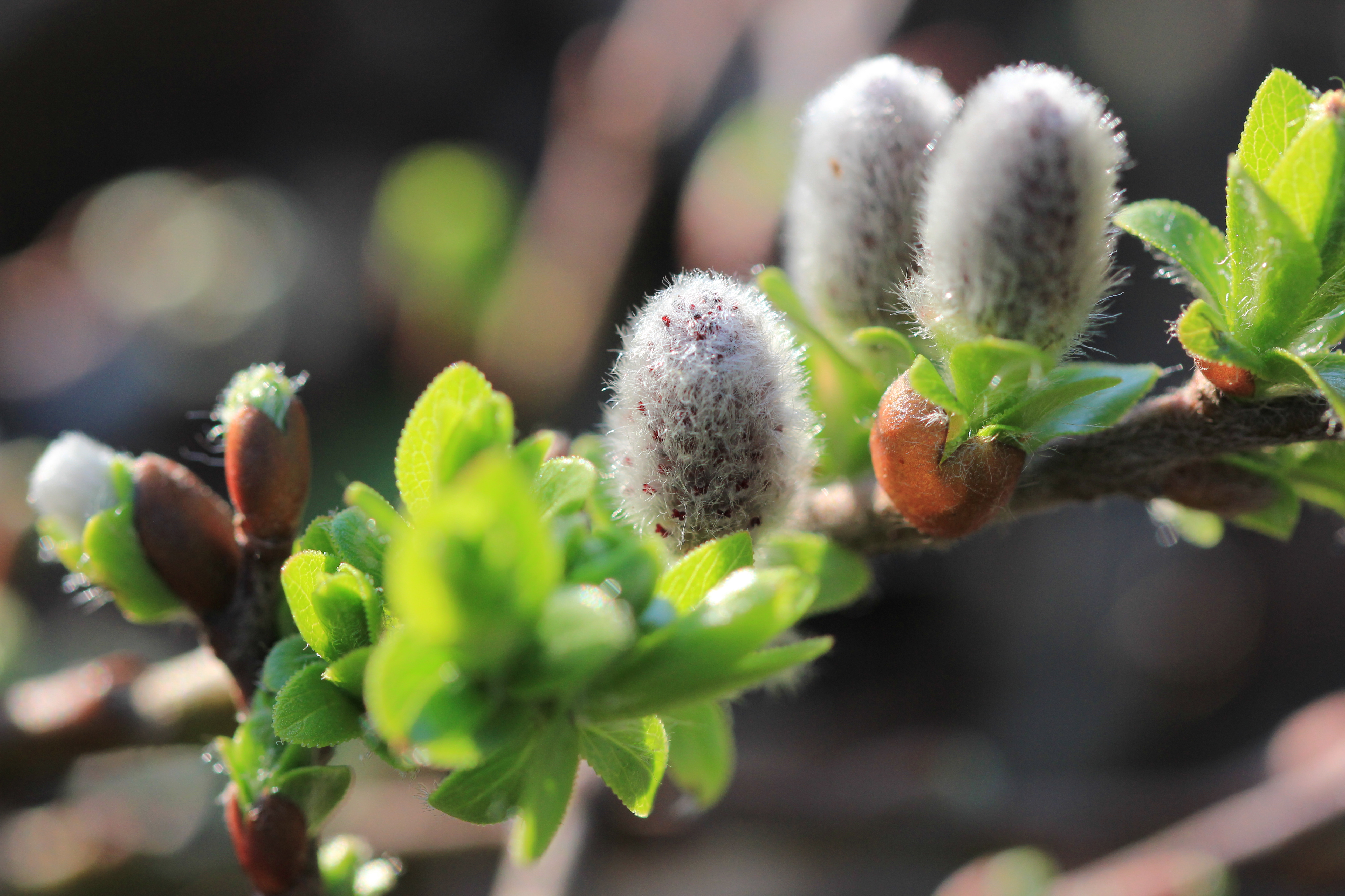 Kurzzahnweide im Botanischen Garten der Universität Wien.